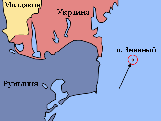 Snake Island